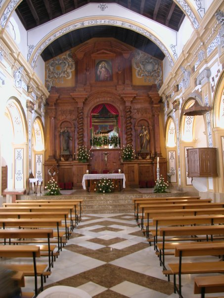 Interior Iglesia Parrquial de Nuestra Señora de Loreto, Algezares (Murcia) siglo XVI, artesonado mudéjar, pinturas barrocas siglo XVIII